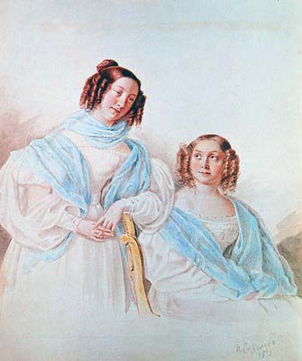 Антонина Дмитриевна (1813-1891) и Лидия Дмитриевна (1815-1882) , дочери Дмитрия Николаевича Блудова (1785-1864).